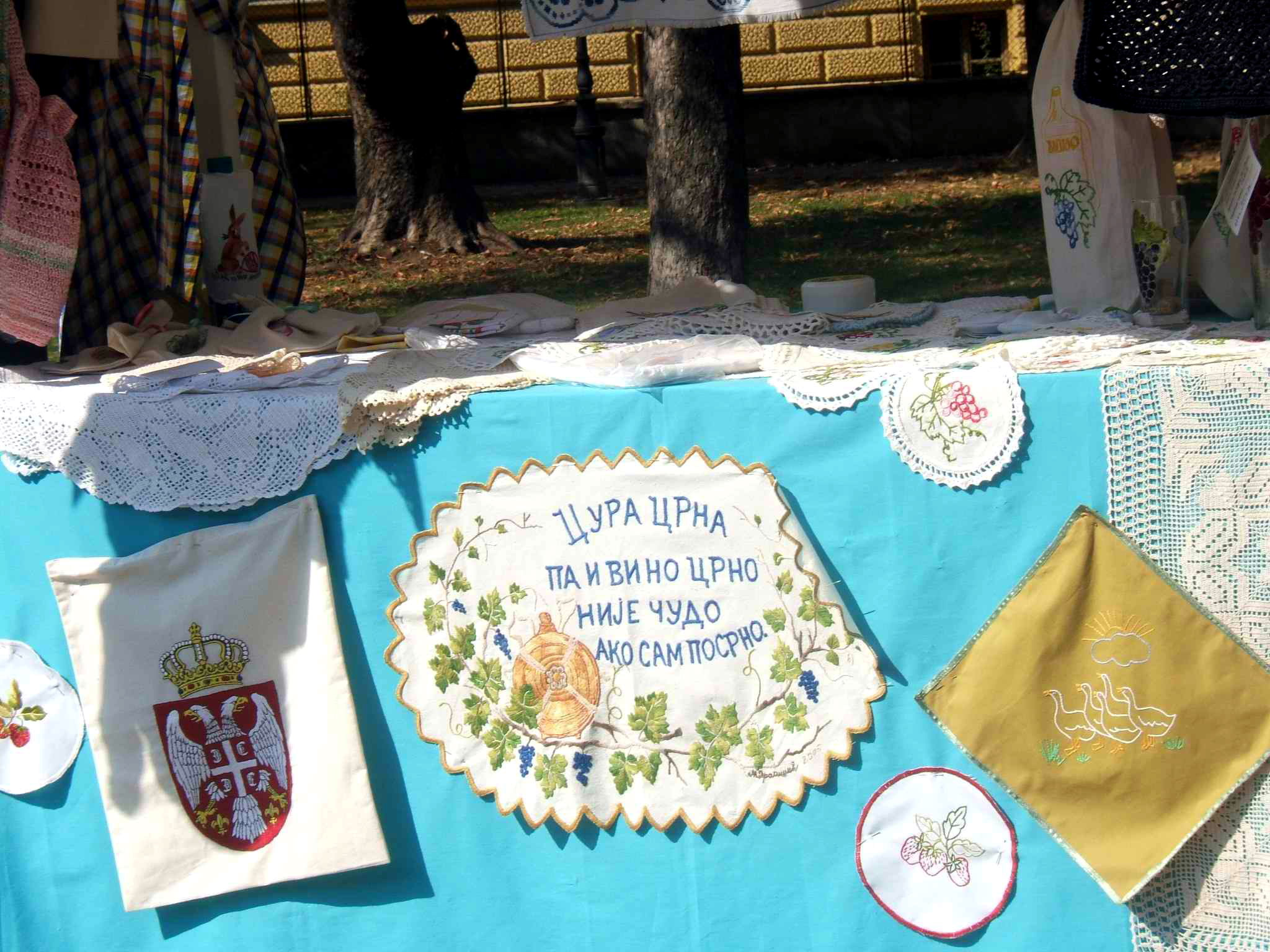 Domaćica vez